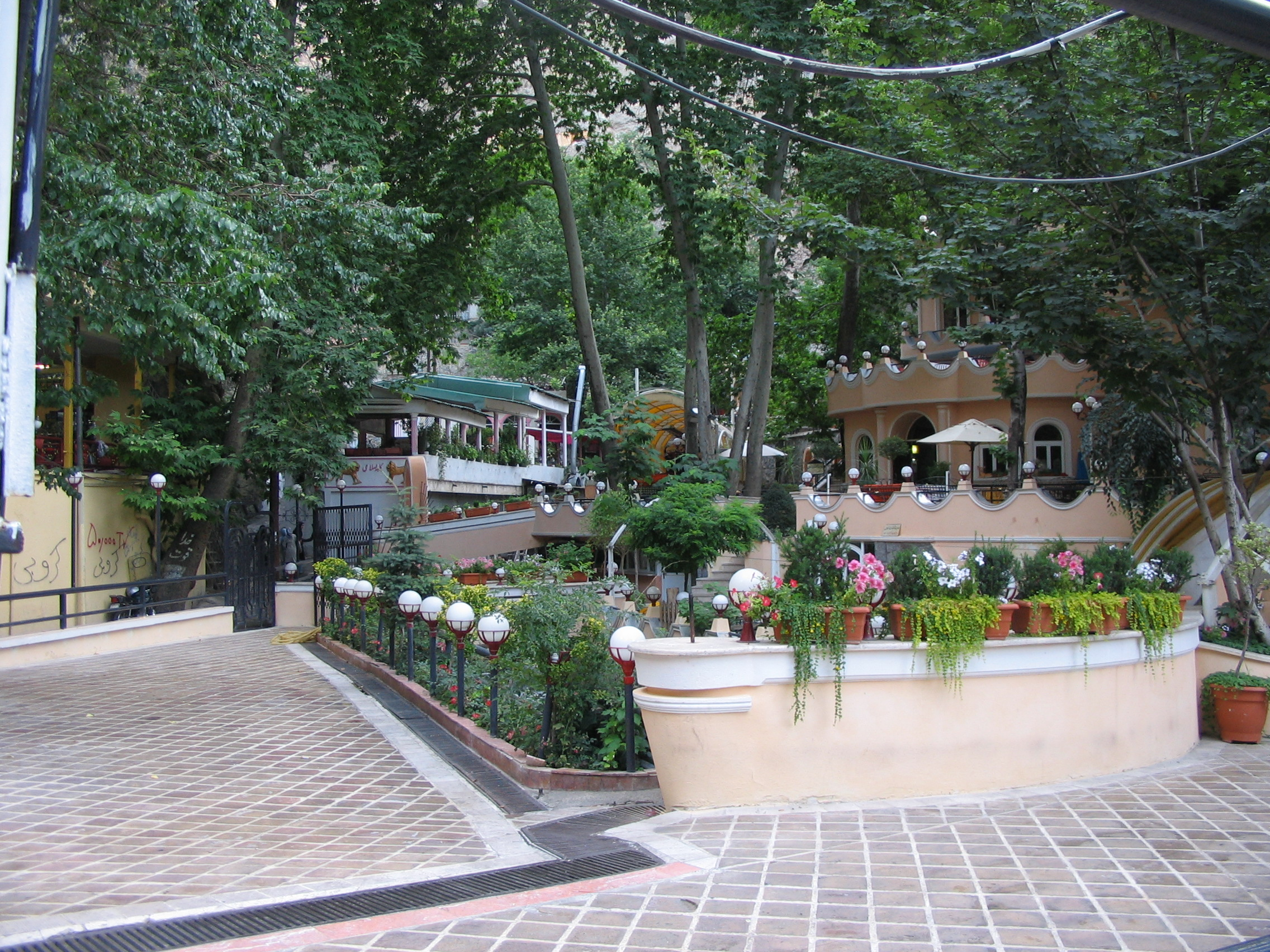 Summer Time, A Resturant in Darband, Tehran, Iran